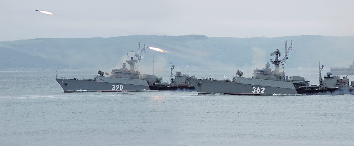 МПК Кореец и Усть-Илимск. Парад ВМФ Владивосток 2007.07.29